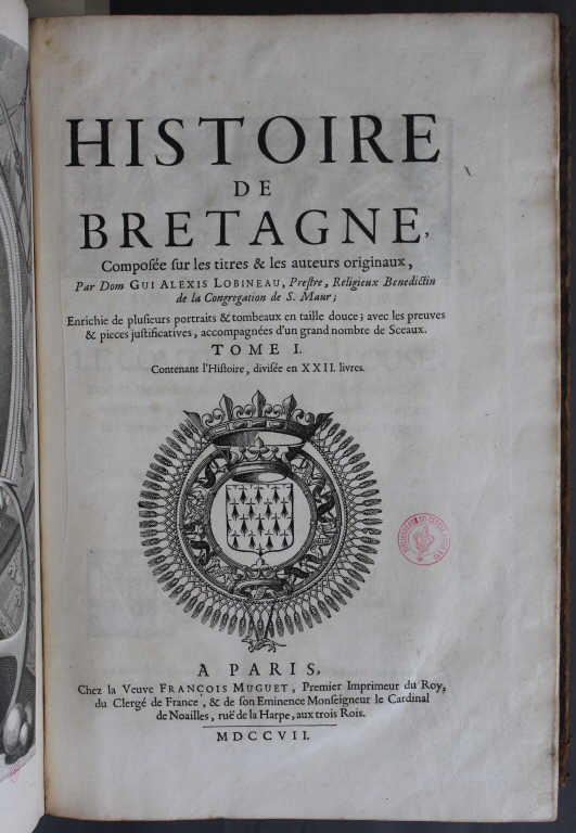 Histoire de Bretagne, de Dom Lobineau